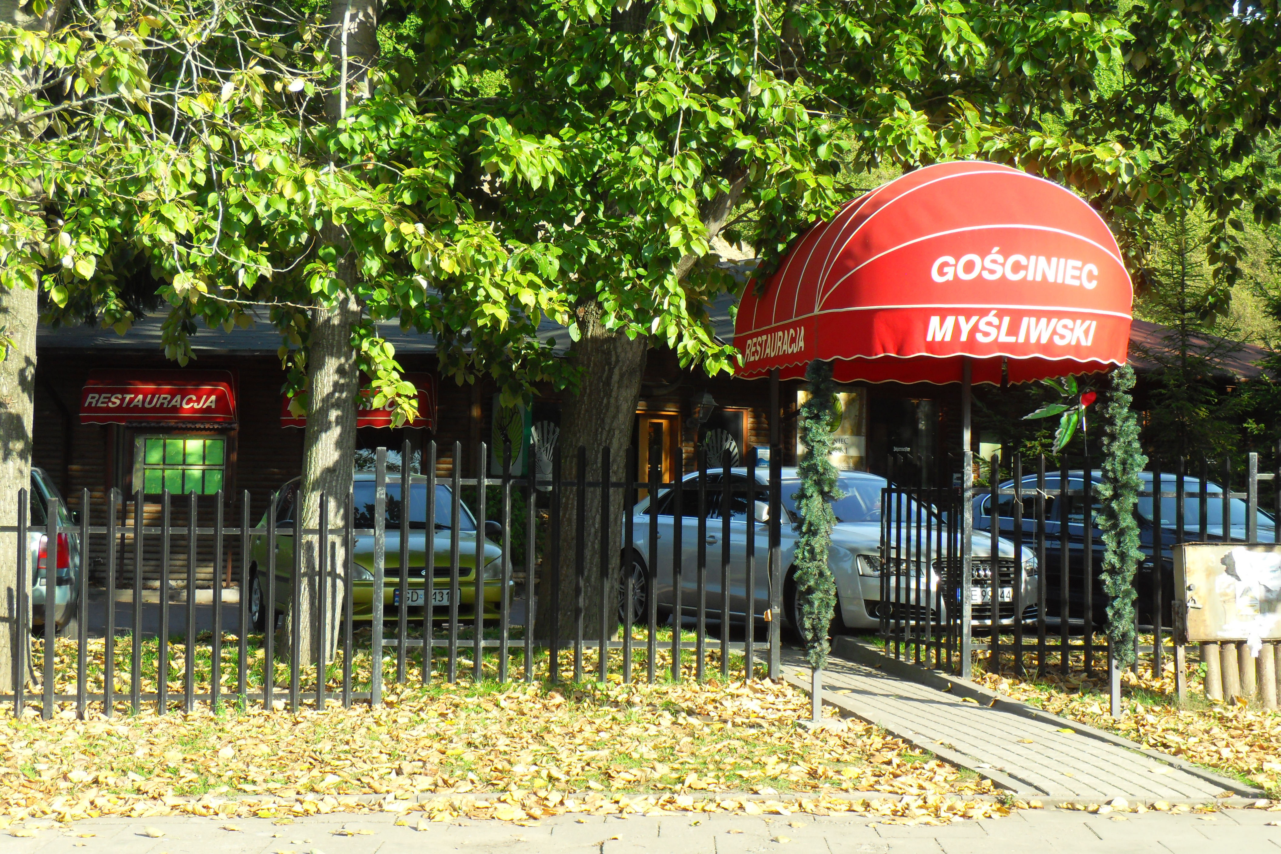 Gdańsk Wrzeszcz Górny, ul. Jaśkowa Dolina 114, restauracja "Gościniec Myśliwski". Wzięła udział w programie TV "Kuchenne rewolucje".